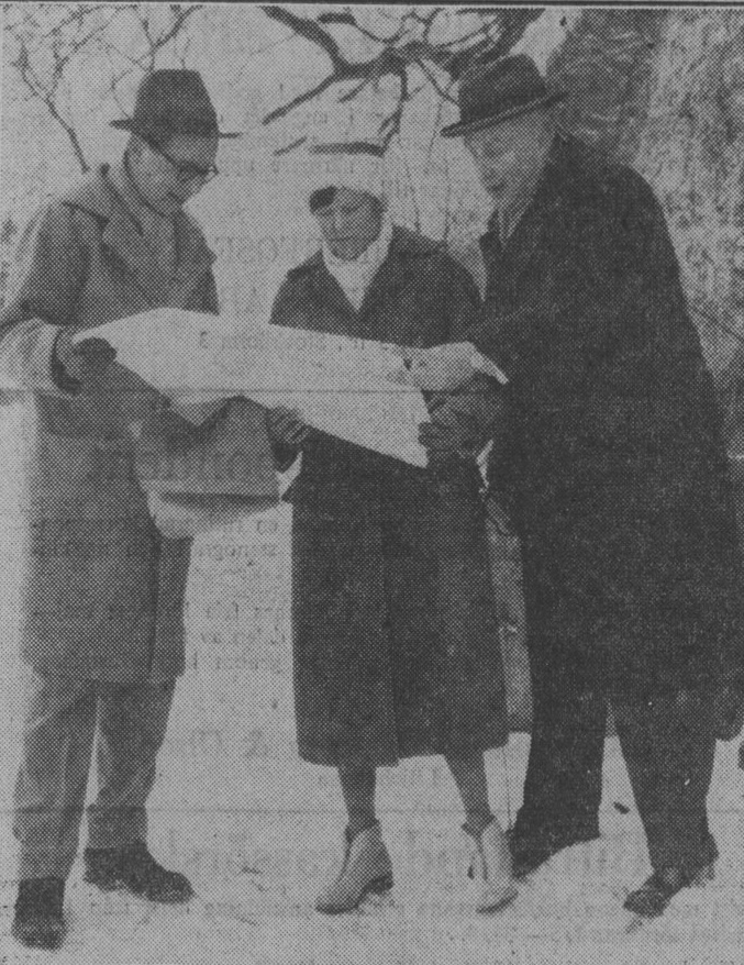 Lars Malm, fru Karin och disponent Gunnar Lavett studerar tilltänkt bebyggelse i Lugnet, Farsta